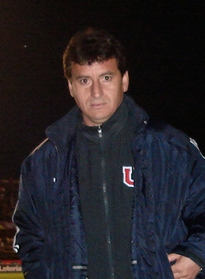 Pedro González, Club de Fútbol Profesional de la Universidad de Chile